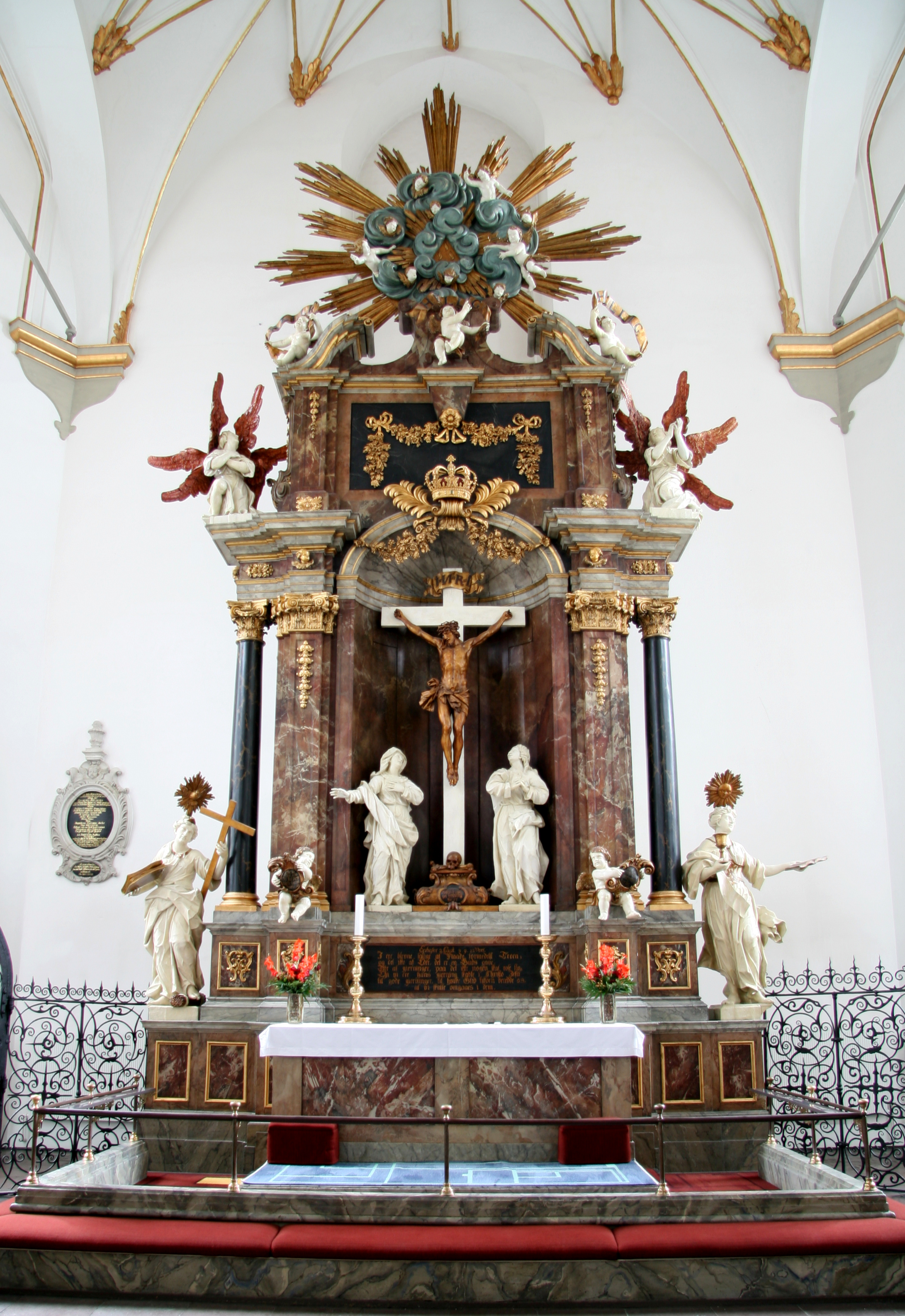 Trinitatis Kirke, Copenhagen, Denmark. Alter.